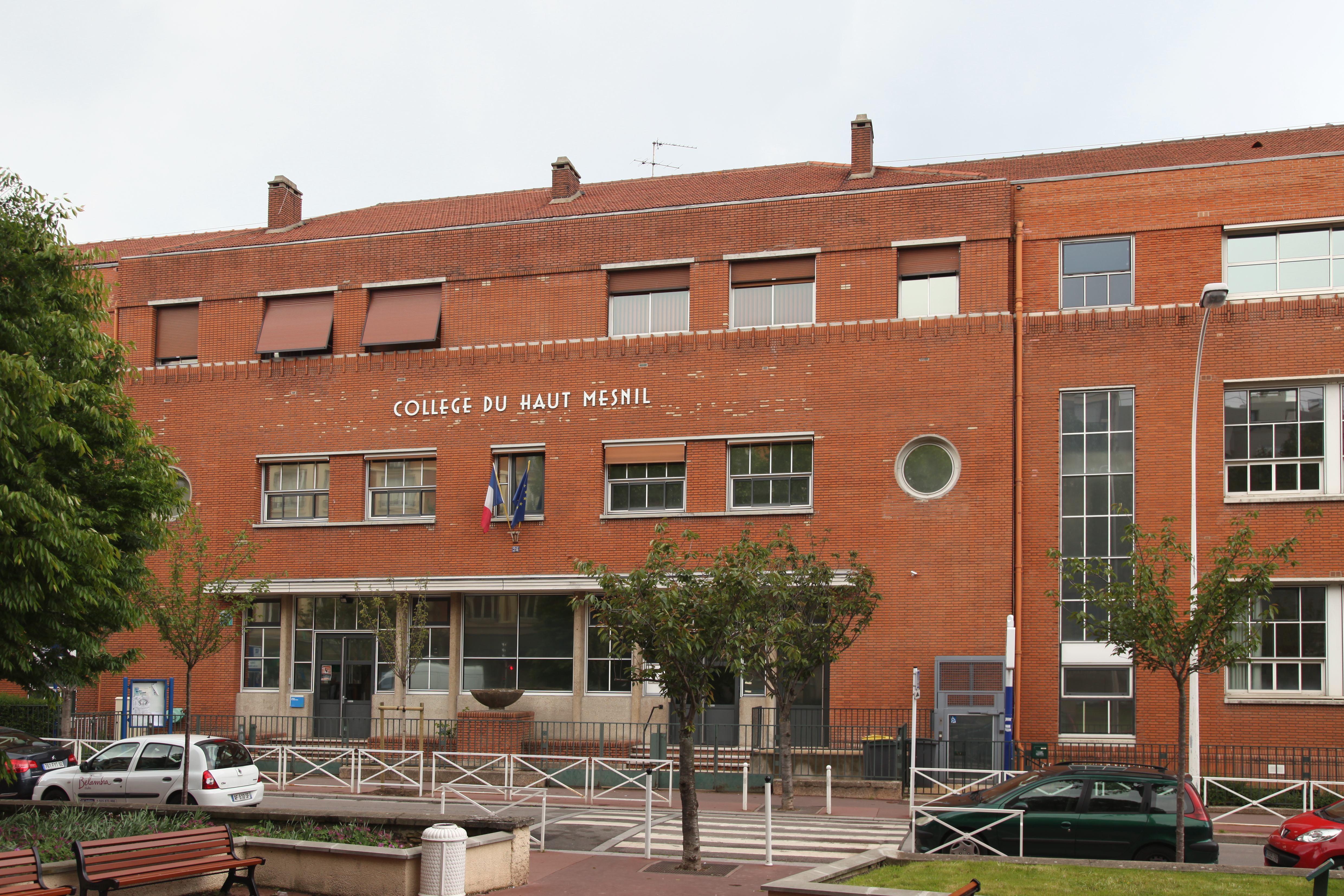 Le collège du Haut Mesnil, rue Arthur Auger, Montrouge